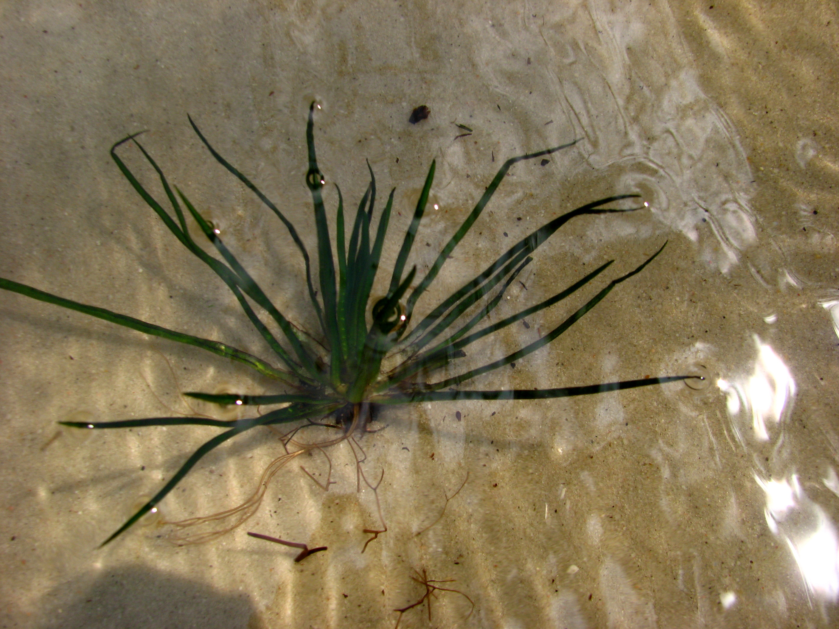 Молодильник озерний (ЧКУ) в Рівненському заповіднику (Білоозерський масив)